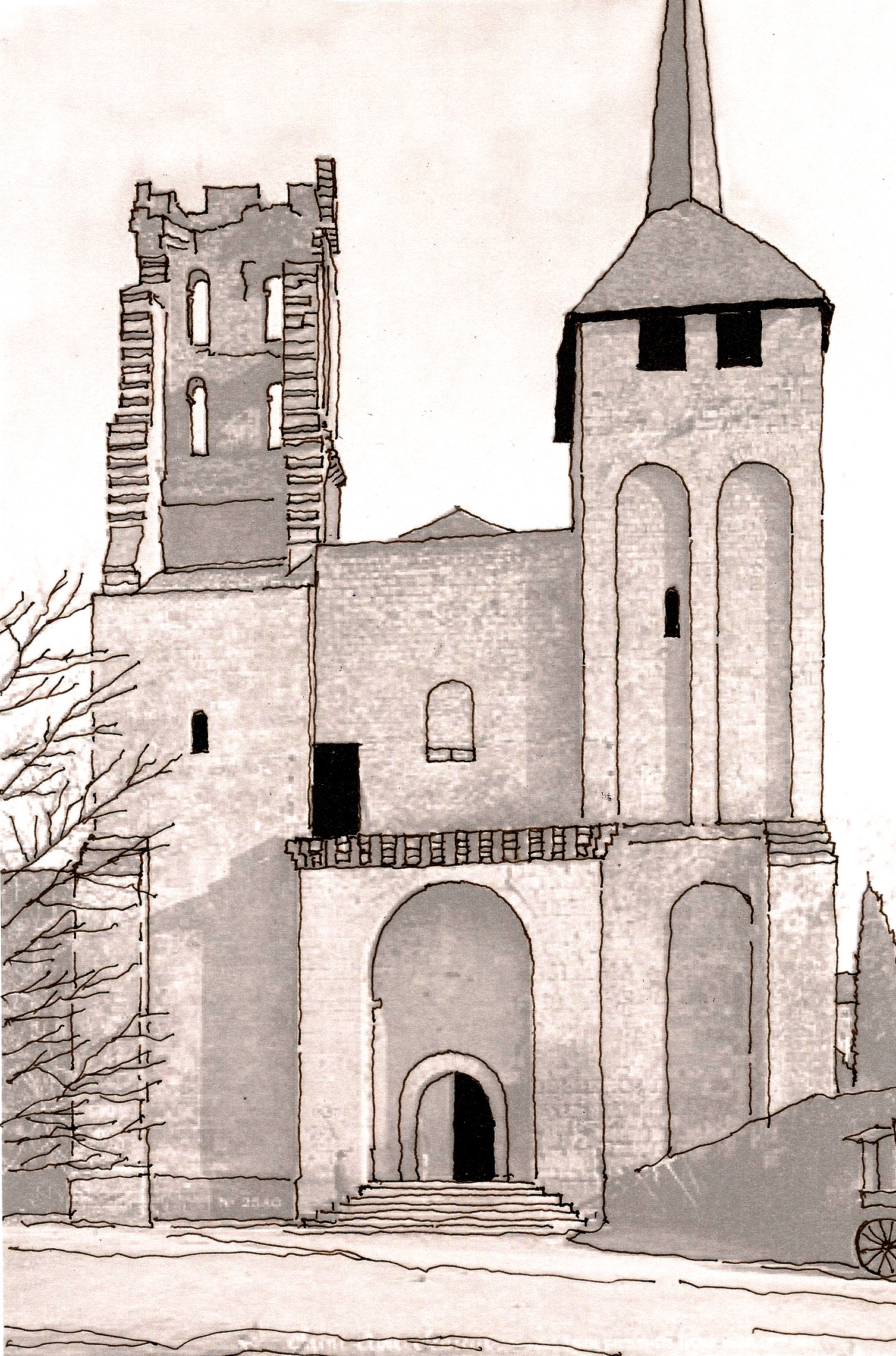 St.-Avit-Sénieur, Prioratskirche, Westwerk, Handskizze